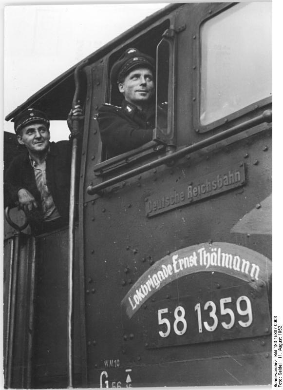 Dampflok 58 1359 (BR 58), Lokbrigade Lokbrigaden im sozialistischen Wettbewerb. Zu einem sozialistischen Wettbewerb mit dem Ziel, auch im Transport- und Verkehrswesen die Neuererbewegung zu entfalten, hat die Lokbrigade "Ernst Thälmann" vom Bahnbetriebswerk Chemnitz-Hilbersdorf gerufen. Hauptaufgaben sind die Erfüllung der täglichen Laufleistung, die Einhaltung der Sollwirtschaftskosten und der Ölverbrauchsnormen sowie eine Senkung des Kohlenverbrauchs um acht Prozent. UBz: Der Lokführer Lorenz und der Heizer Claus von der Lokbrigade "Ernst Thälmann". Zentralbild-Seidel Me-We. 11.8.1952